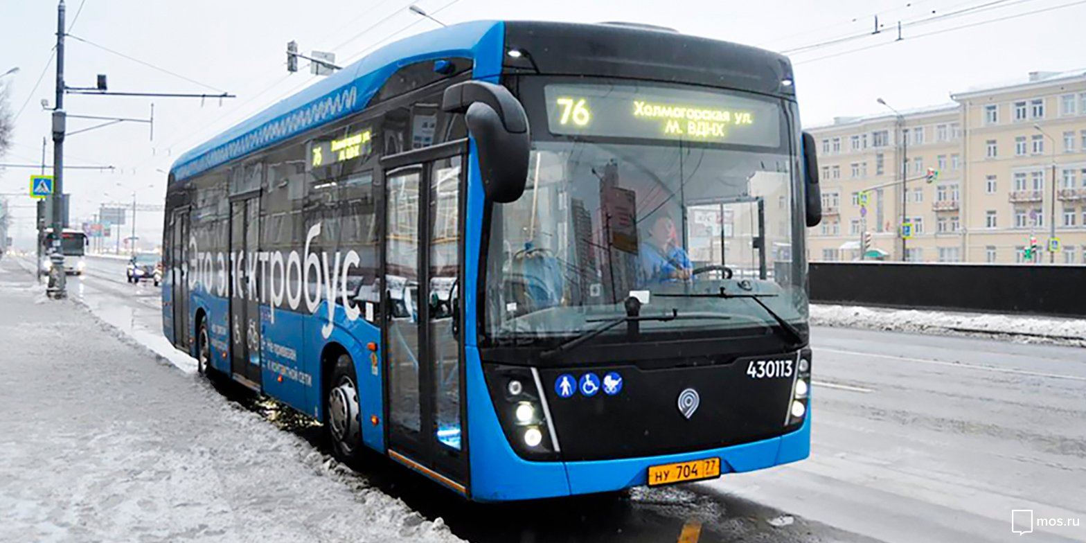 Электробус производства КАМАЗ на линии 76-го маршрута. Москва, декабрь 2018